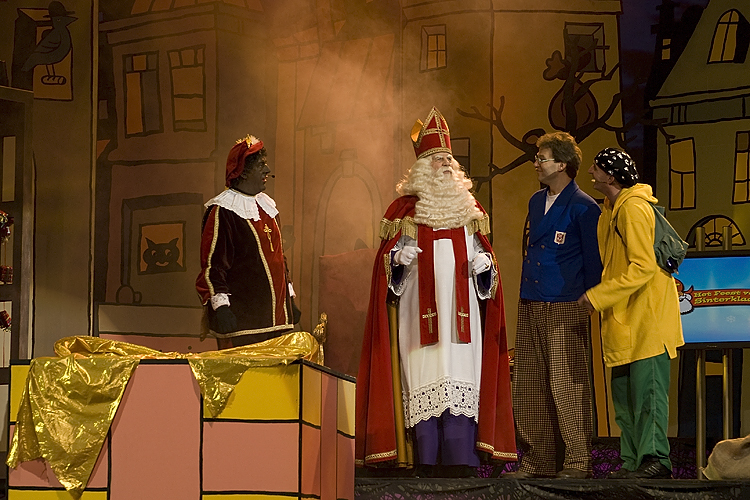 Het Feest van Sinterklaas Walon: sinne del fiesse del Sint-Nicolai